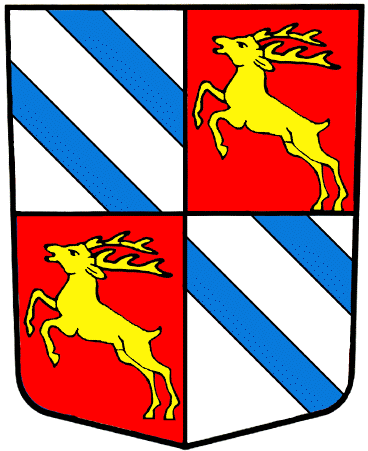 Wappen von Vionnaz Kanton Wallis Schweiz